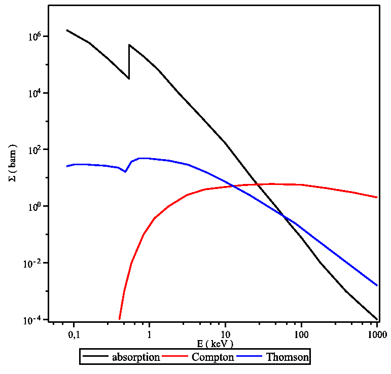 Coefficients d'extinction dans l'eau pour un photon